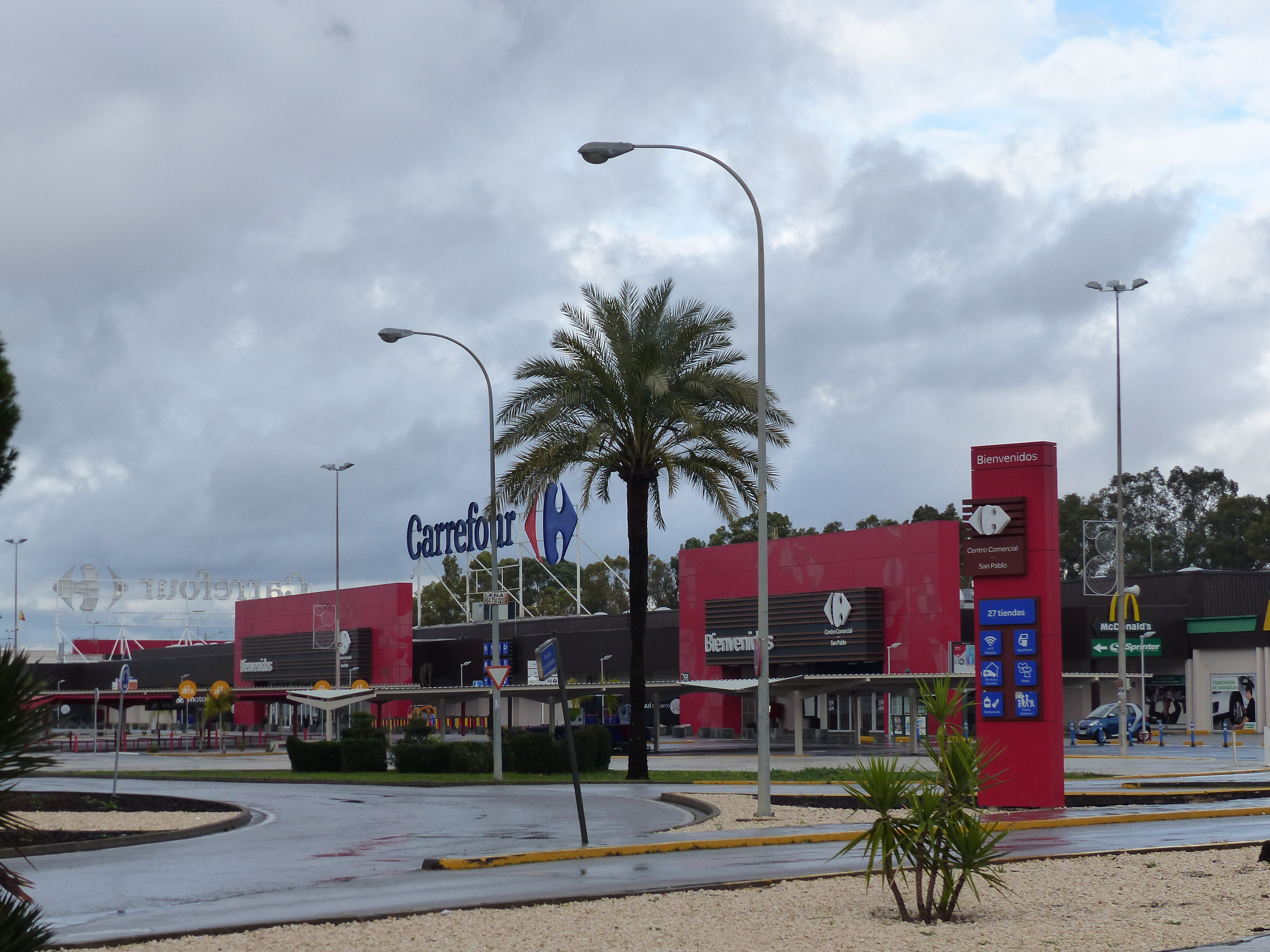 Carrefour, Sevilla Este